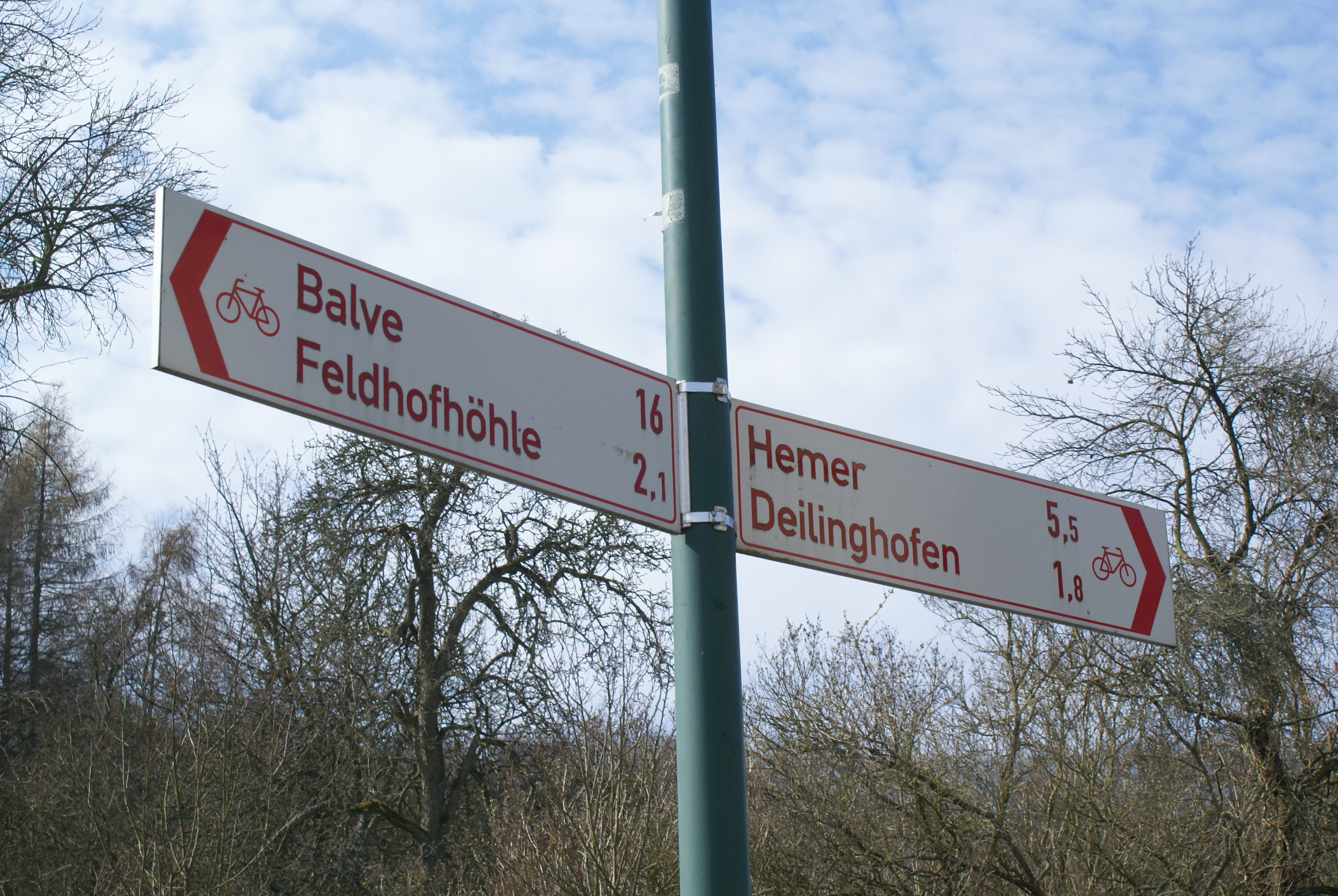 Ein Wegweiser des Radverkehrsnetz NRW in Hemer-Brockhausen (Märkischer Kreis, Nordrhein-Westfalen, Deutschland) weist in die Richtungen Balver und Hemer.